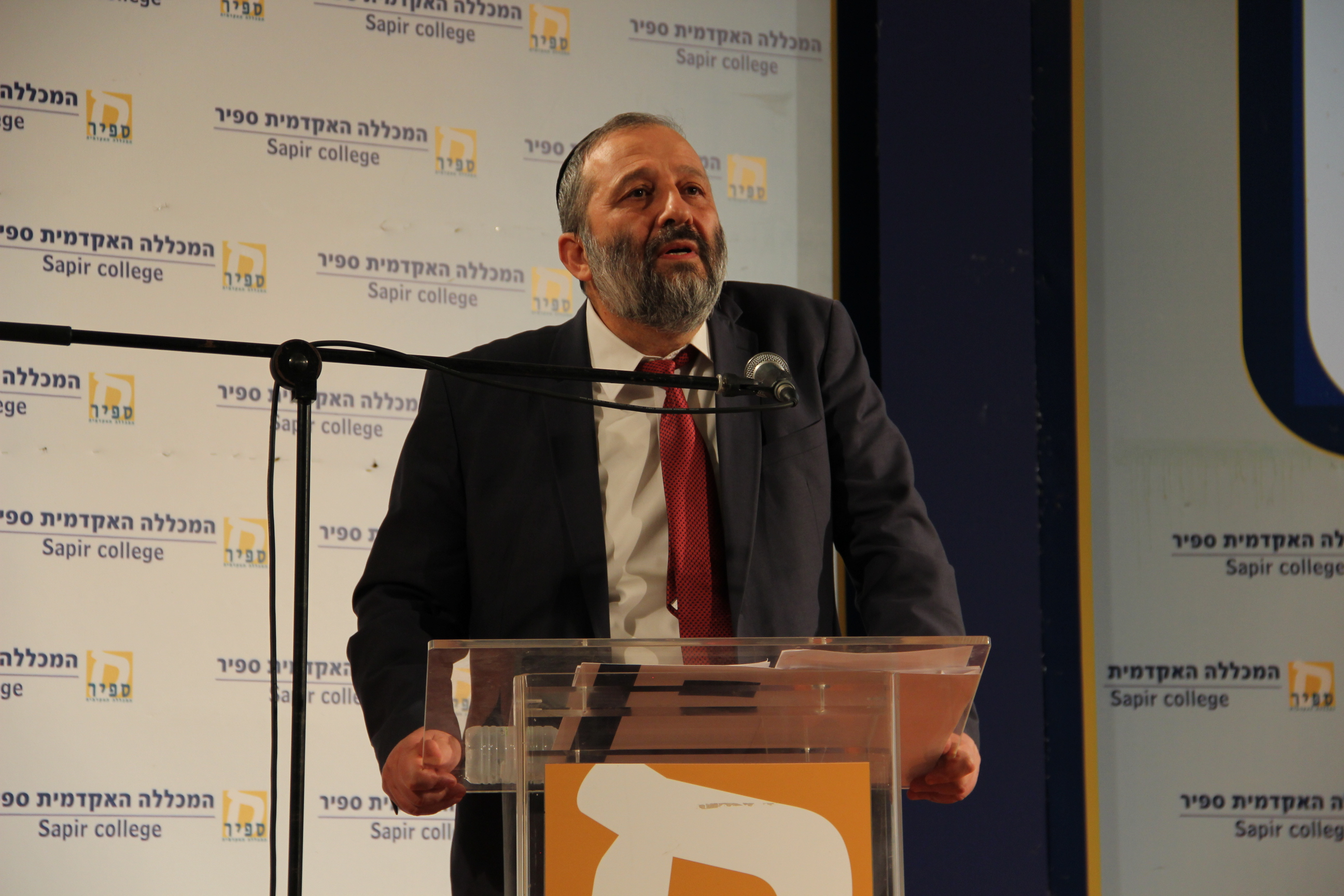 כנס שדרות לחברה במכללה האקדמית ספיר ובעיר שדרות 2015